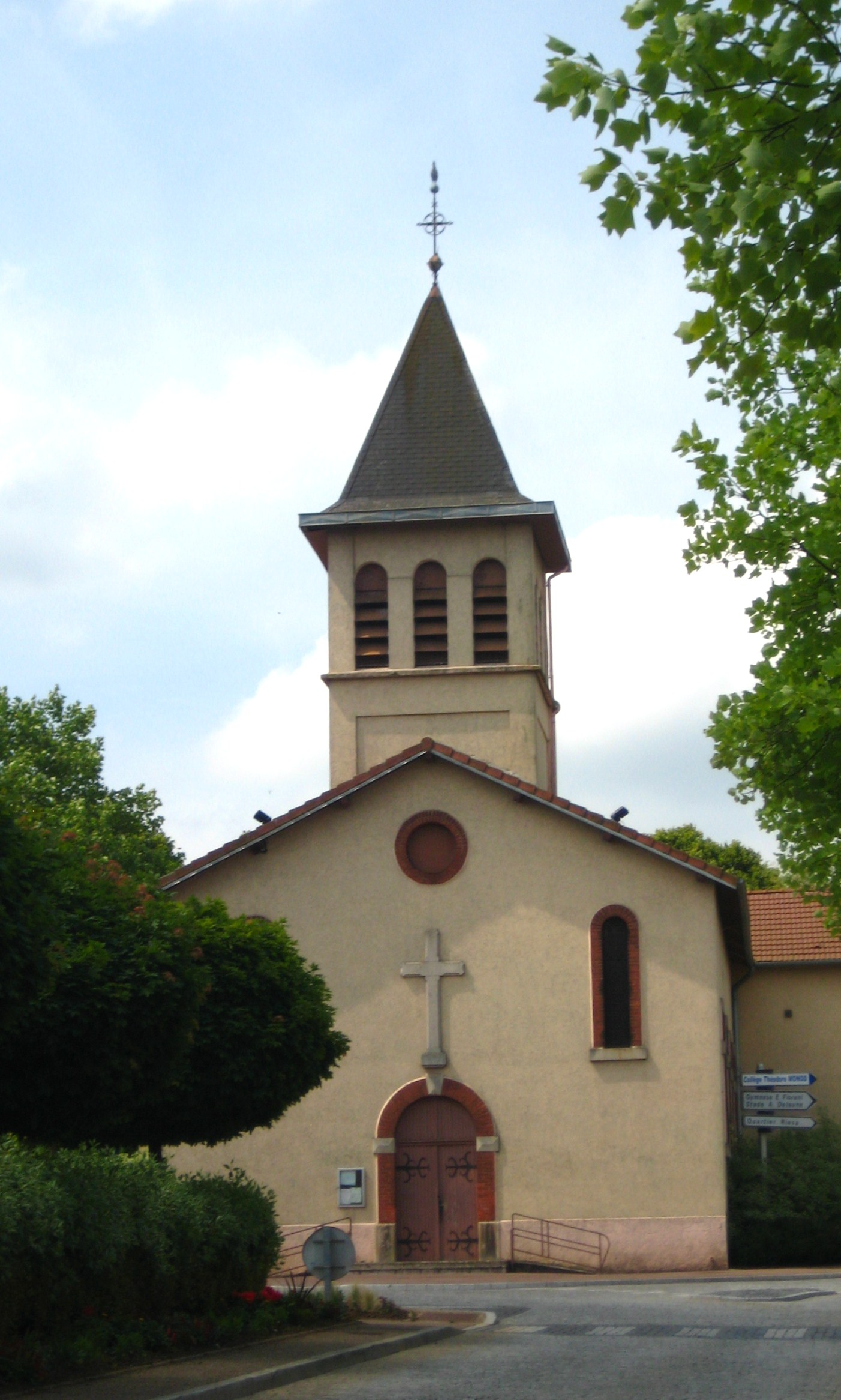 Description Chapelle Sainte-Croix de CantebonneDate 25 June 2009Source mon appareil photoAuthor Aimelaime Chapelle Sainte-Croix de Cantebonne